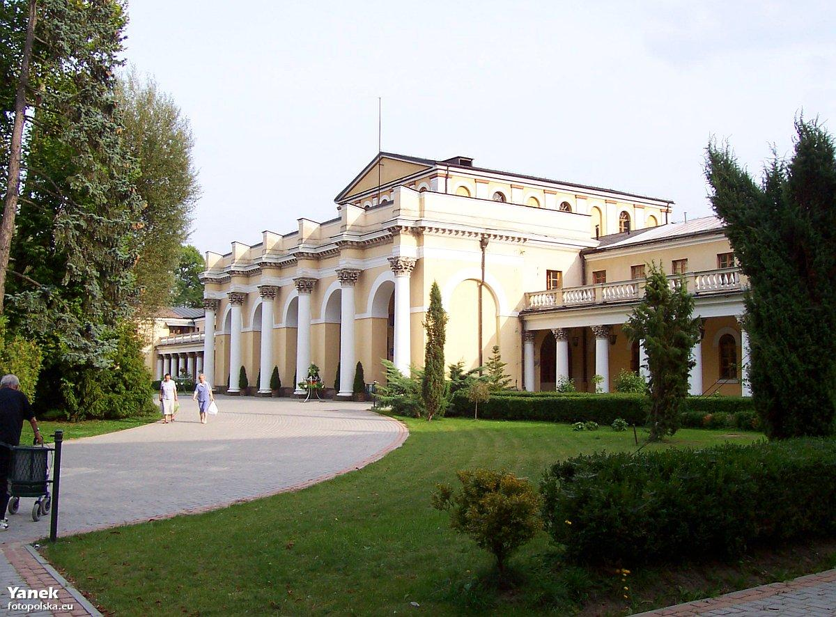 Łazienki w Busku Zdroju